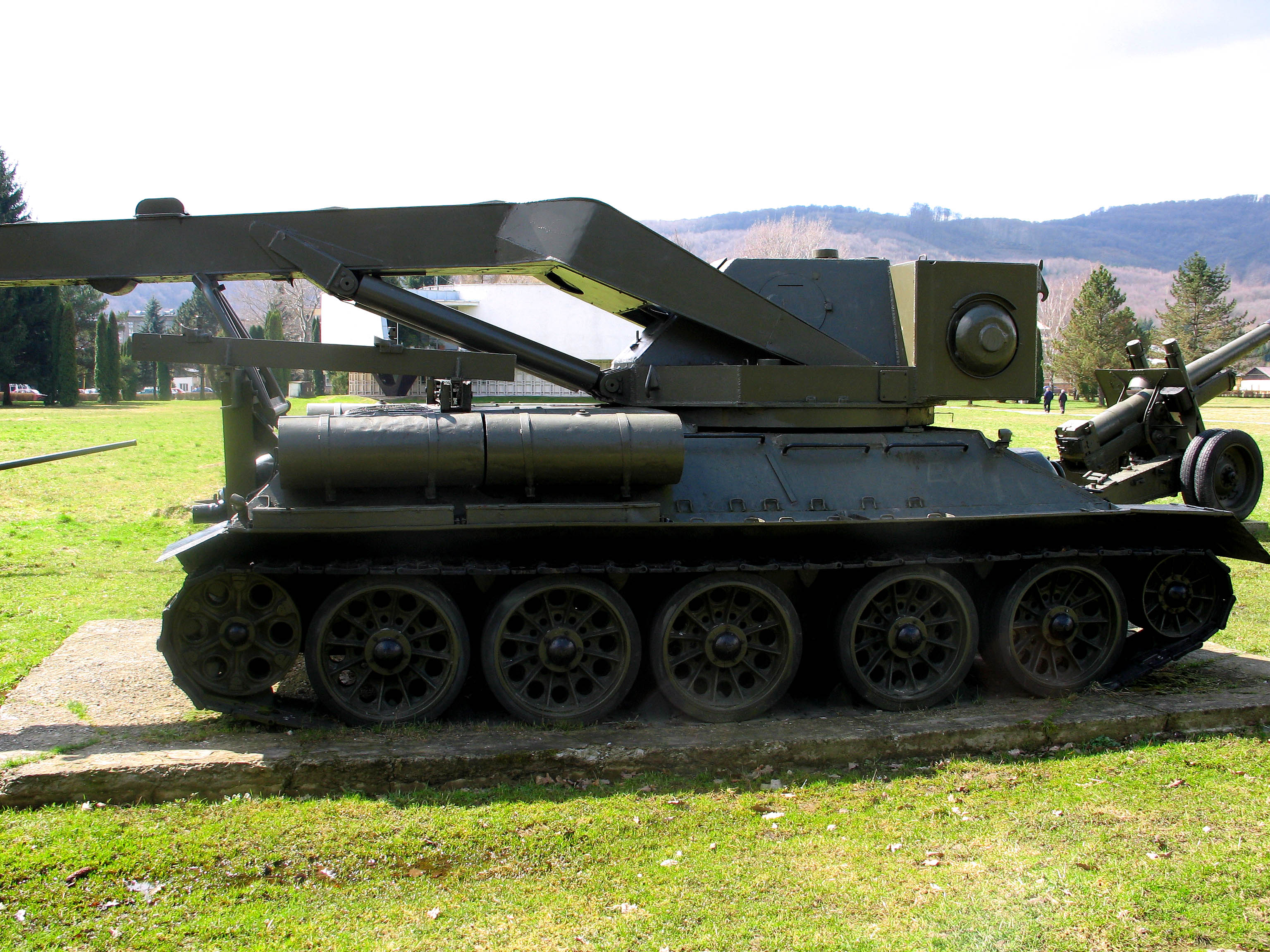 Vojenská technika z druhej svetovej vojny v parku bojovej techniky